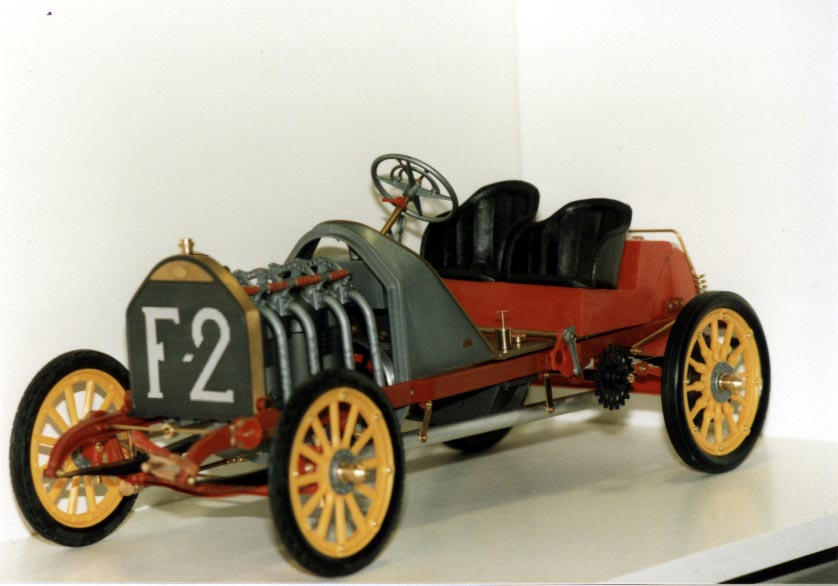 Eigen foto.